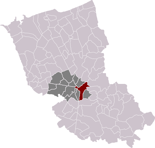 Locatie gemeente Kassel (Frans-Vlaanderen) in arrondissement Duinkerke. Zelfgemaakt. Location of Cassel municipality in the arrondissement of Dunkirk. Self made. Localisation de la commune de Cassel dans l'arrondissement de Dunkerque. Fait moi-même.